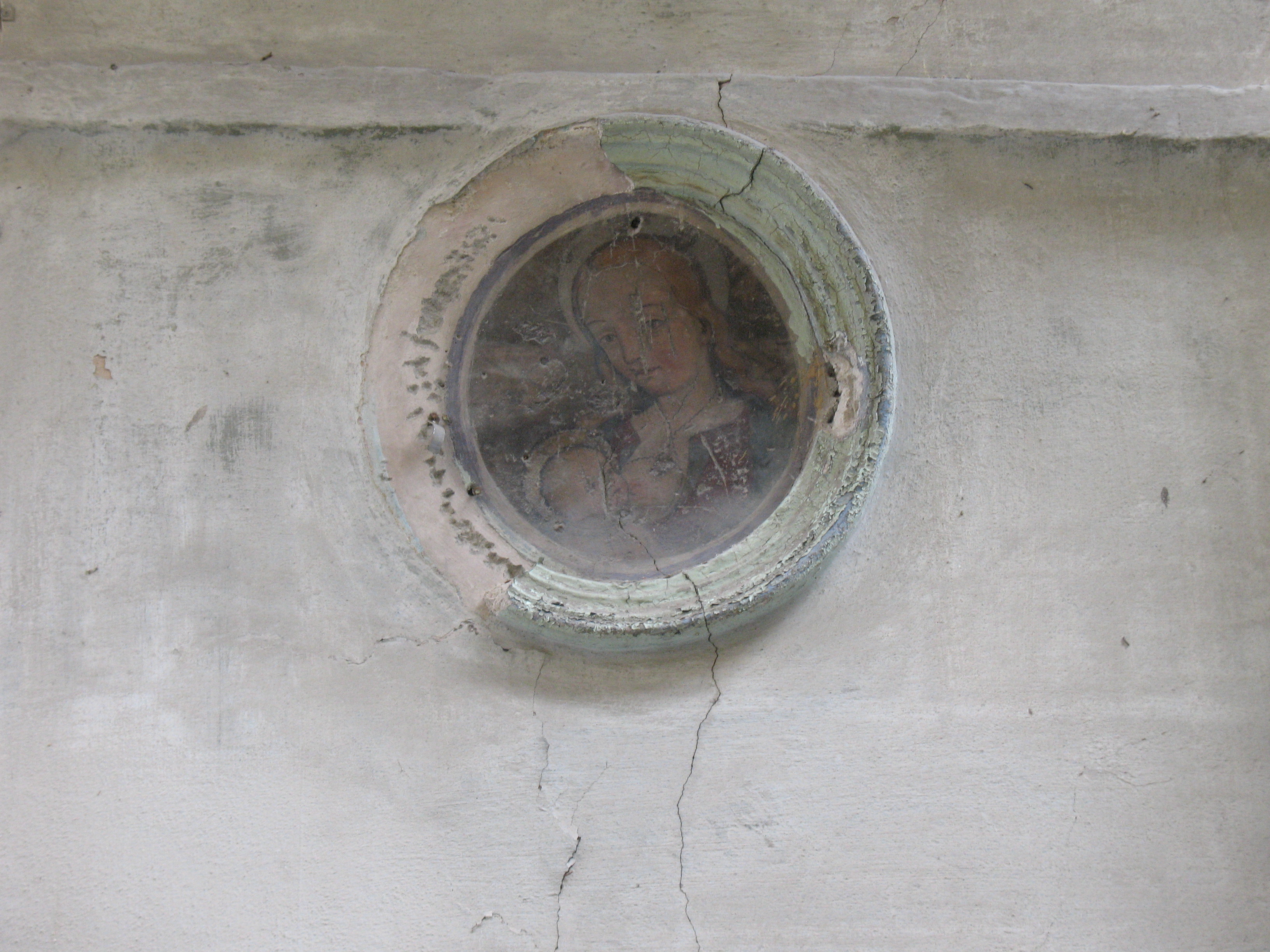 Maria lactans an der Fassade der Casa Clary in Sampeyre, Varaitatal, Piemont